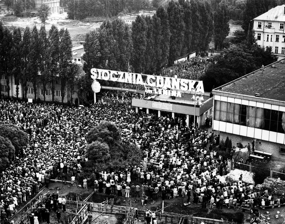 Widok z góry na Bramę nr 2 Stoczni Gdańskiej im. Lenina i tłumy solidaryzujących się ze strajkującymi mieszkańców Gdańska